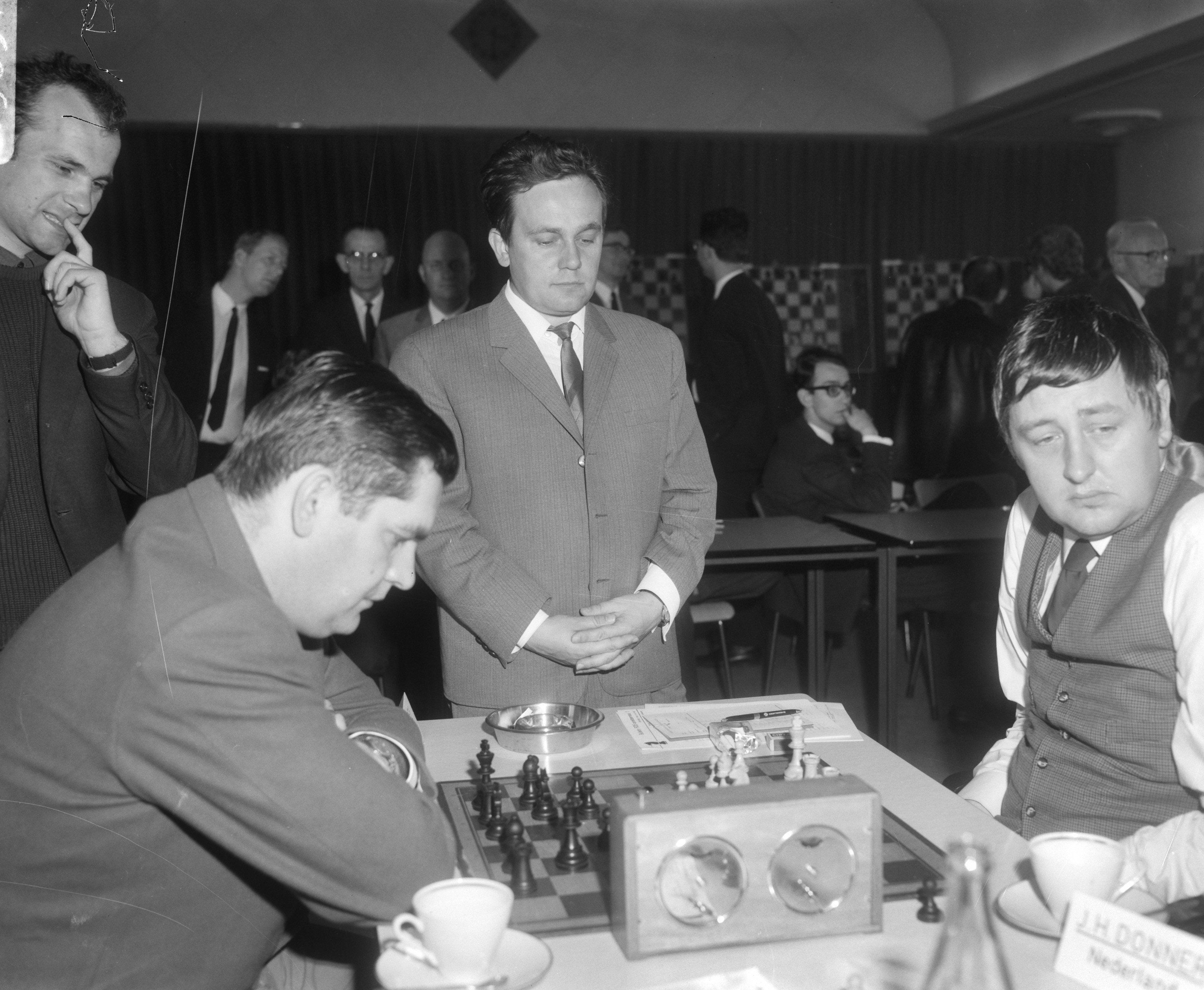 Collectie / Archief : Fotocollectie Anefo Reportage / Serie : Fédération Internationale des Échecs (FIDE) -Zone schaaktoernooi 1966 in de kantine van 'De Nederlanden van 1845' te Den Haag Beschrijving : Tijdens de partij tussen Jan Hein Donner (r) en de Belgische Josef Boey, kijkt de Hongaarse grootmeester Istvan Bilek toe Datum : 7 oktober 1966 Locatie : Den Haag, Zuid-Holland Trefwoorden : schaken, sport, toernooien Persoonsnaam : Bilek, Istvan, Bilek, Josef, Donner, Jan Hein Fotograaf : Bilsen, Joop van / Anefo Auteursrechthebbende : Nationaal Archief Materiaalsoort : Negatief (zwart/wit) Nummer archiefinventaris : bekijk toegang 2.24.01.04 Bestanddeelnummer : 919-6516